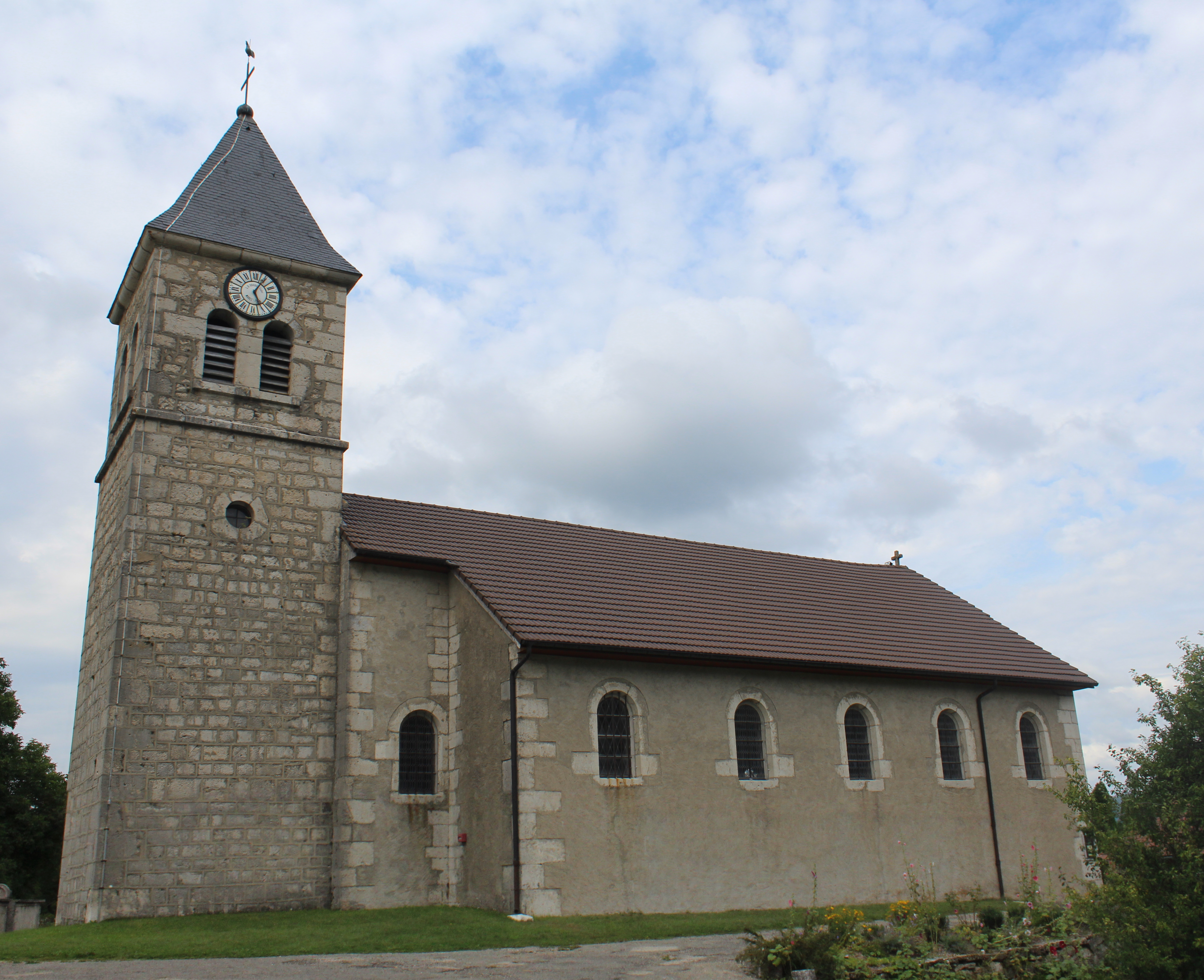 Église Saint-Blaise de Lalleyriat, Le Poizat-Lalleyriat.